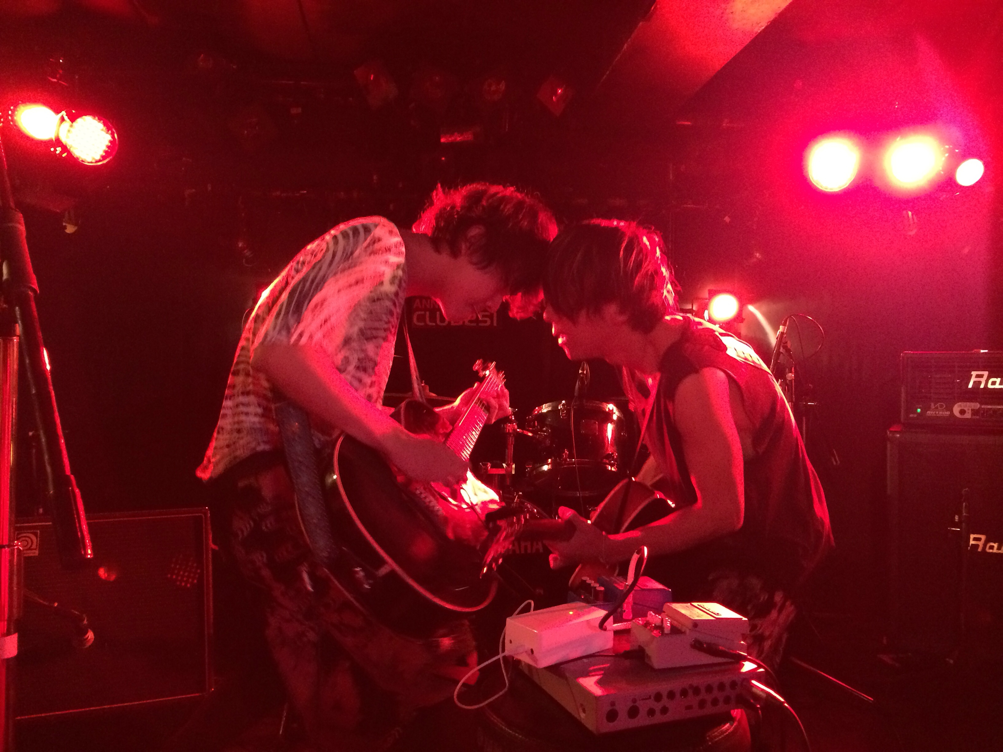 インディーズ時代のLive画像